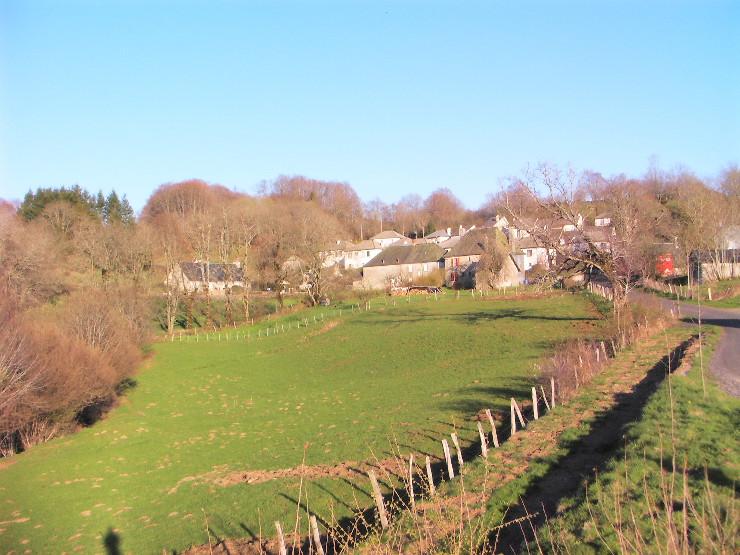 Valette (Cantal)